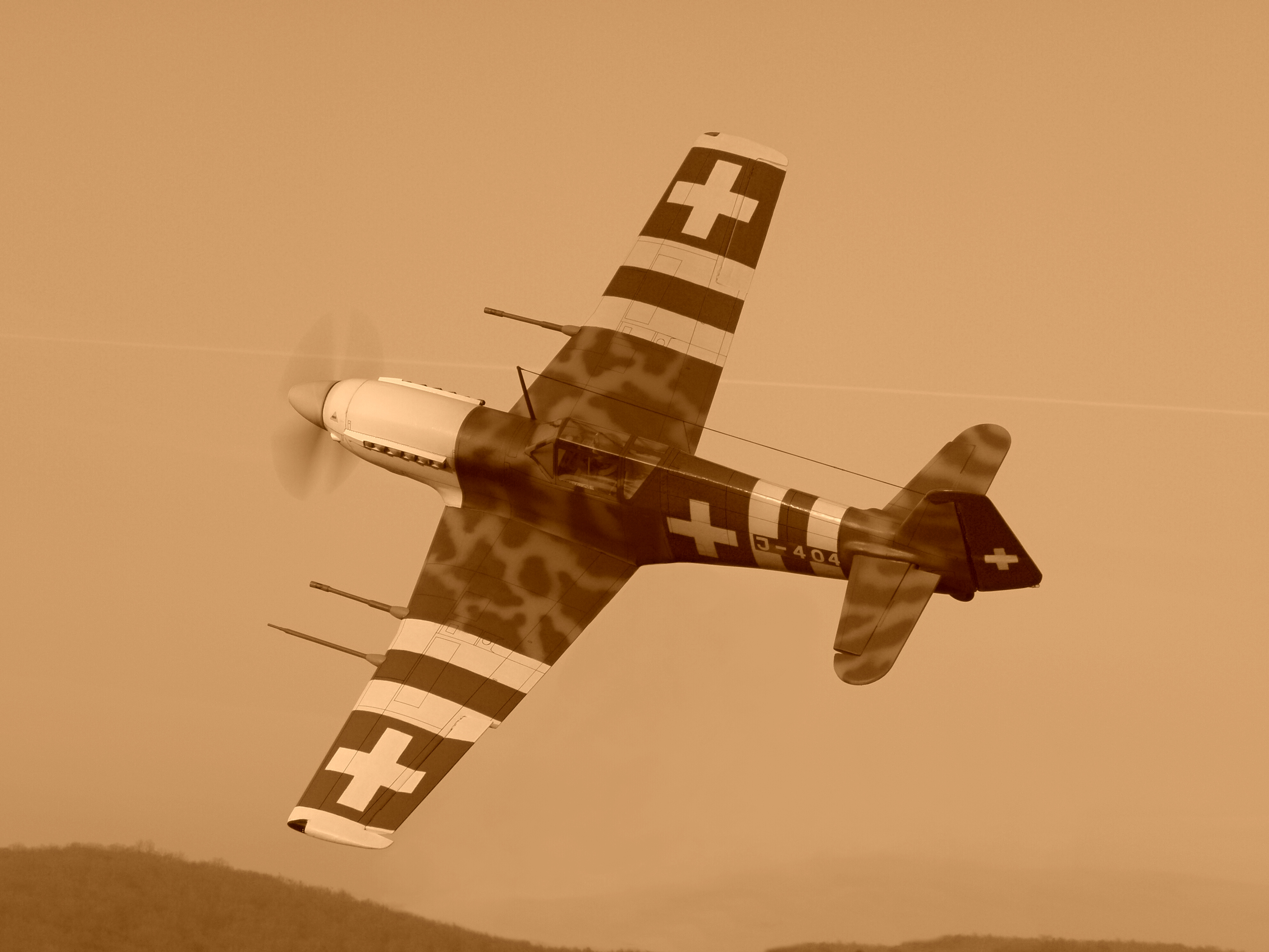 Silueta Doflug D-3802A v letu s kanóny